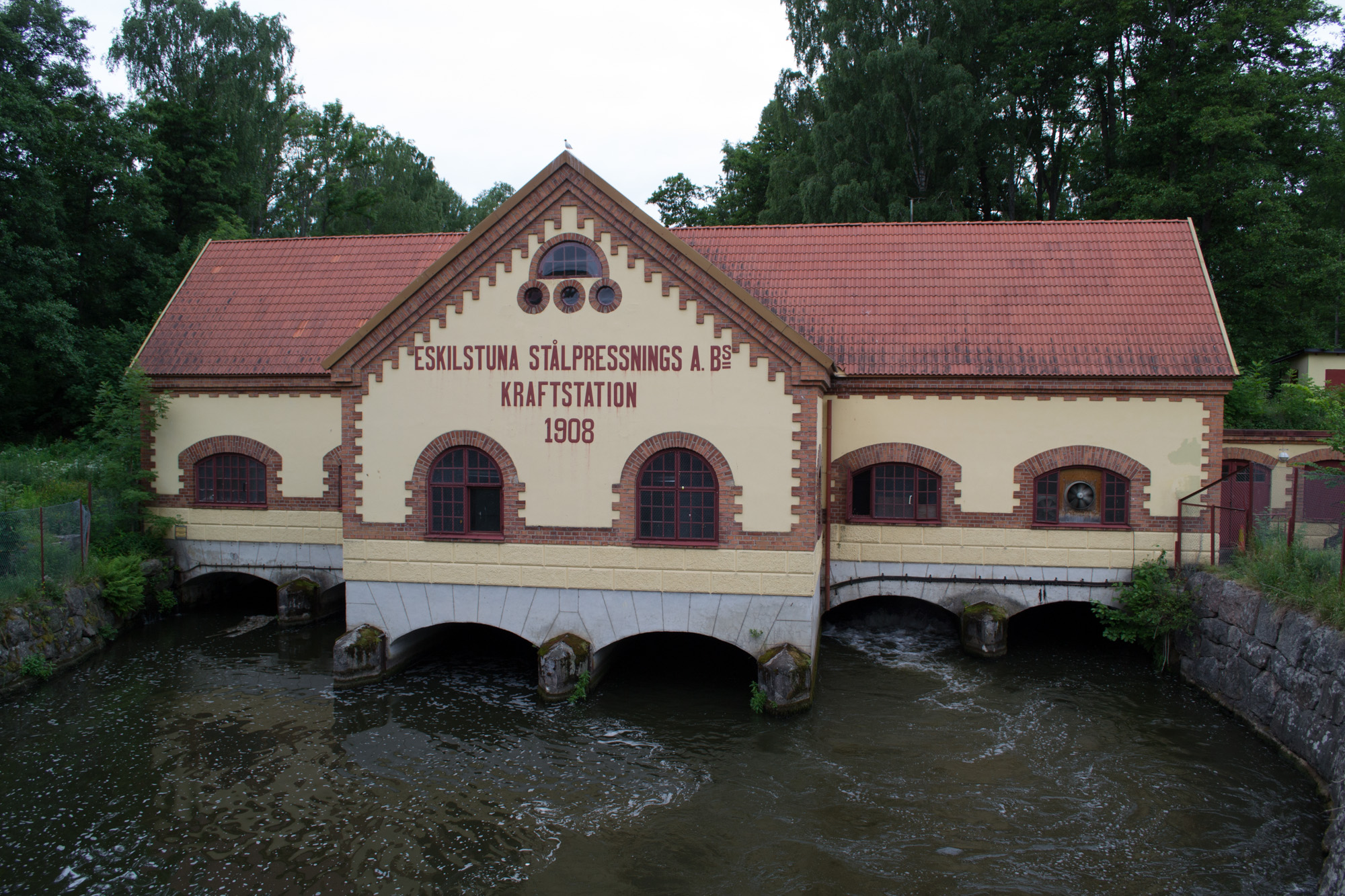 Rosenfors-3